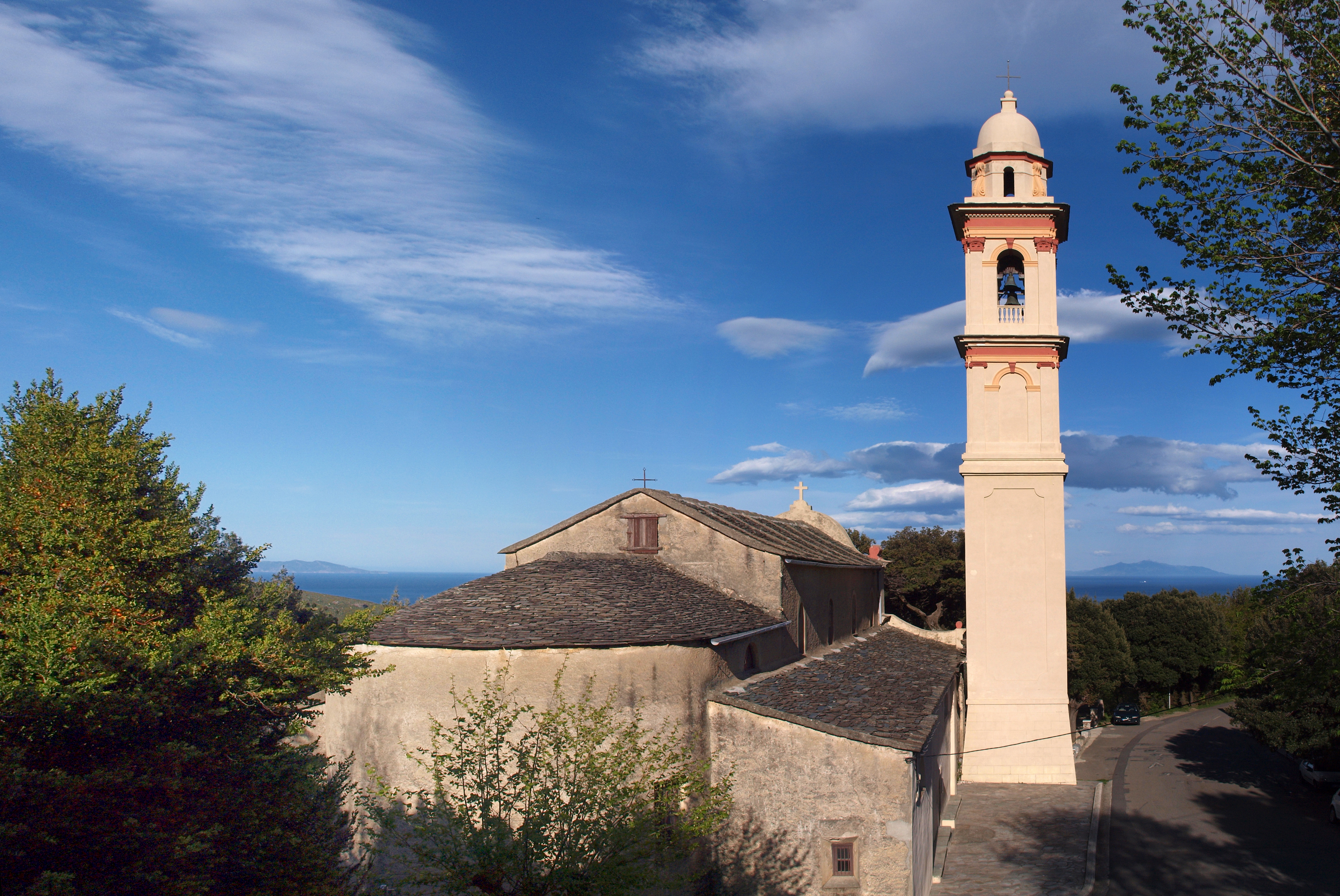 Sisco, Cap Corse (Corse) - Chevet de l'église Saint-Martin à Poggio. Sur l'horizon, à gauche l'île de Capraia et à droite, l'île d'Elbe